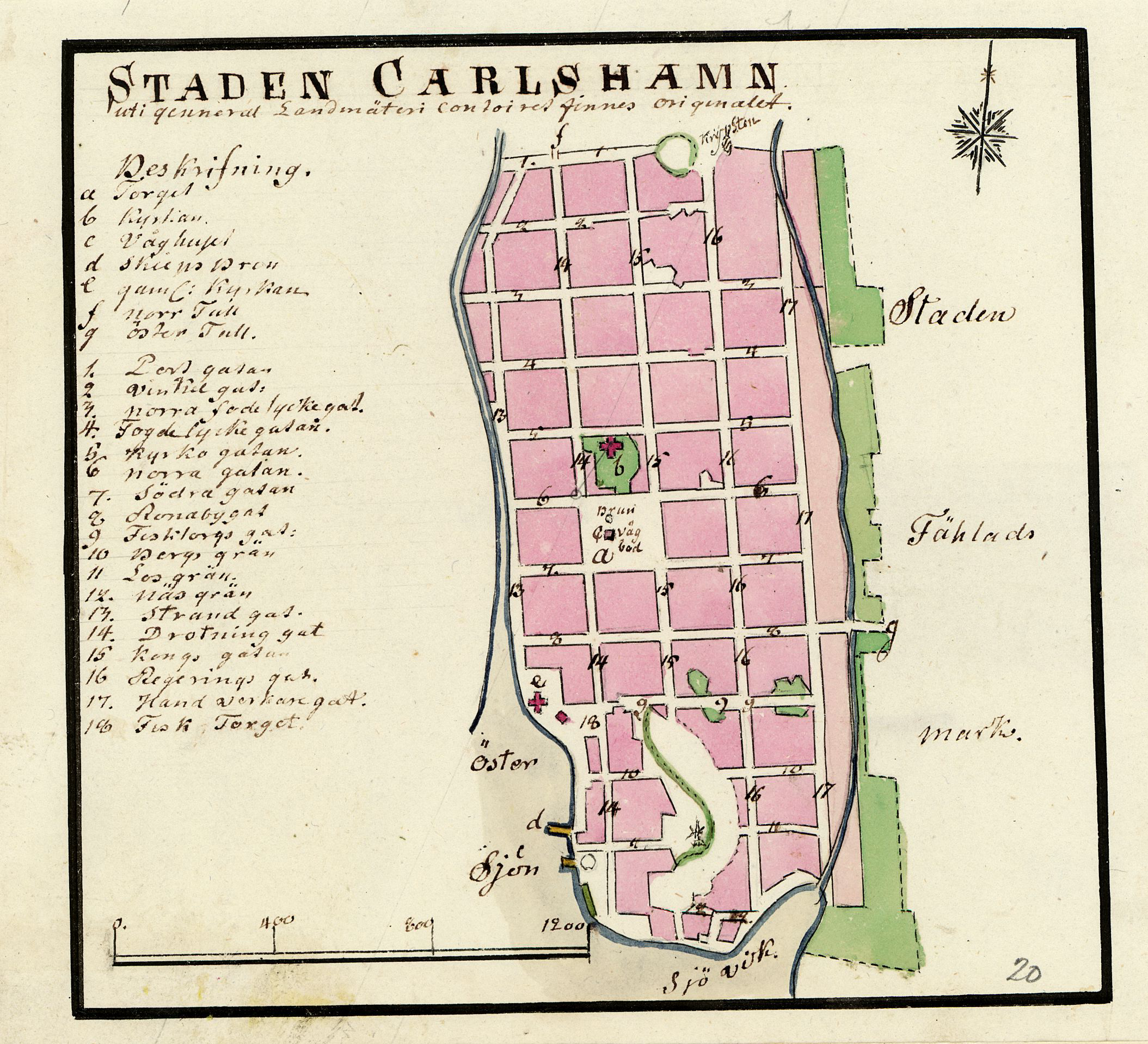 Karta över Karlshamn från ca: år 1800 av Fredrik Adolf Wiblingen.